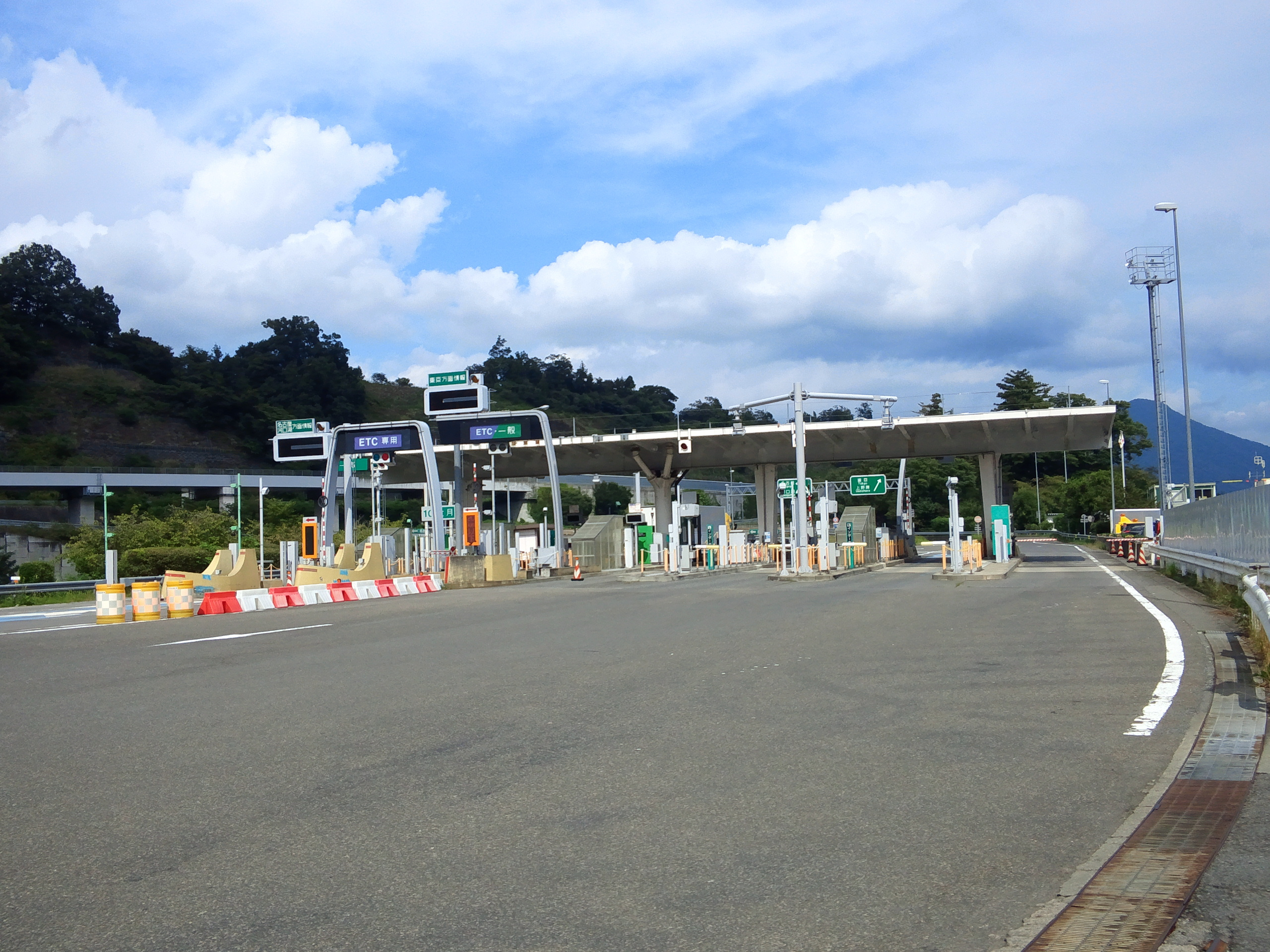 中央自動車道大月インターチェンジ料金所付近（道路外から撮影）